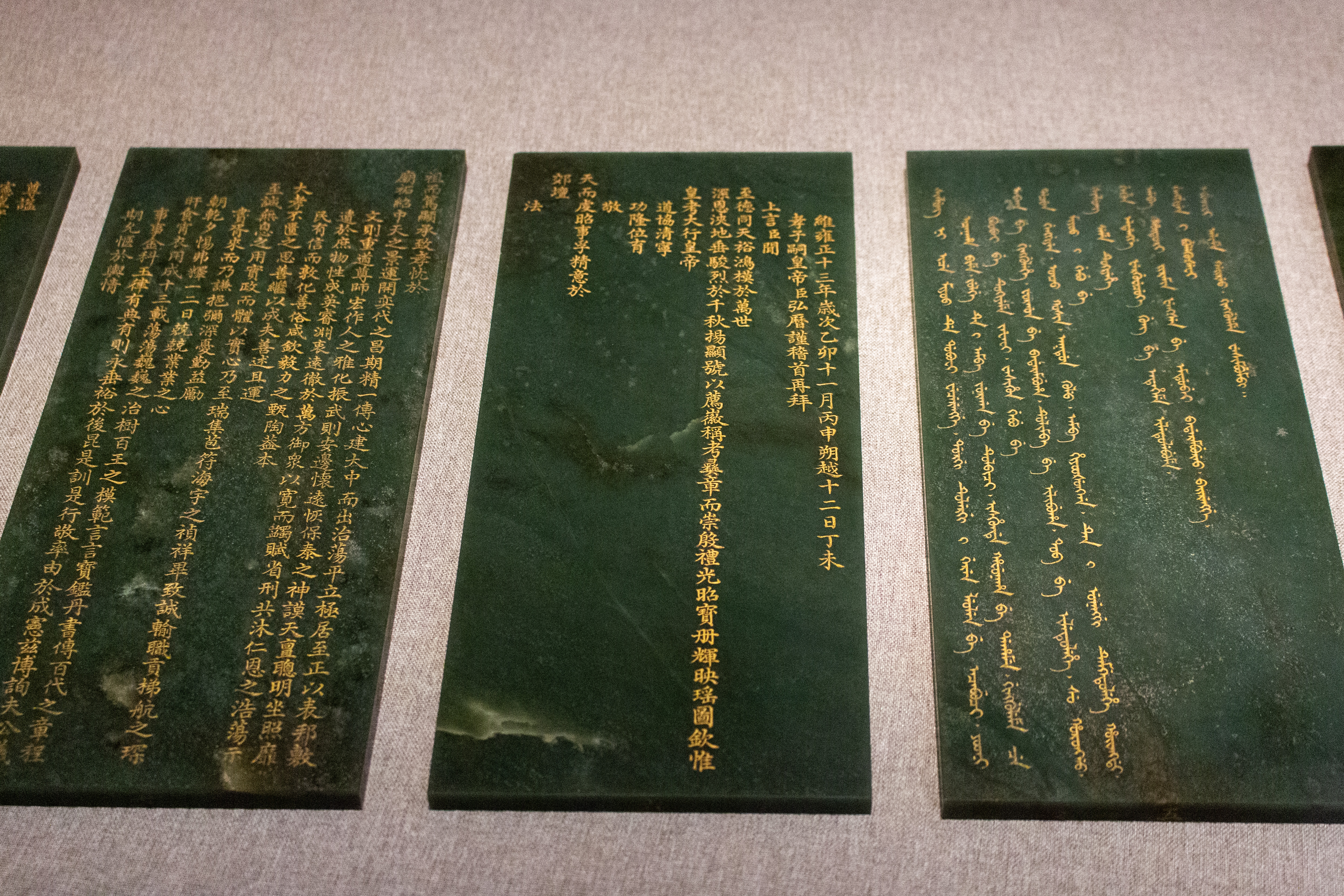 碧玉雍正十三年上世宗宪皇帝谥册，摄于上海奉贤博物馆“雍正故宫文物大展”